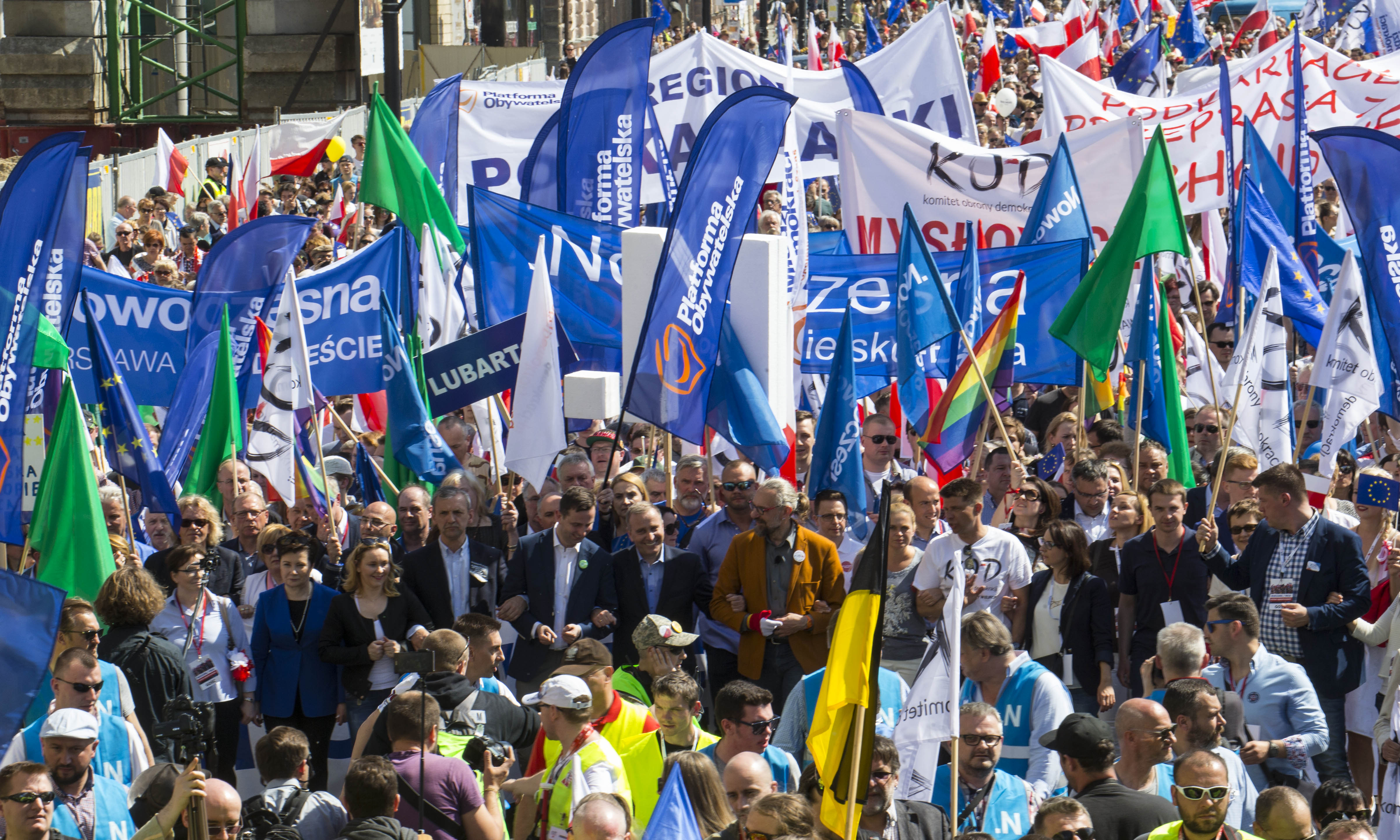 Manifestacja Jesteśmy i będziemy w Europie zorganizowana przez Komitet Obrony Demokracji i partie opozycyjne w Warszawie